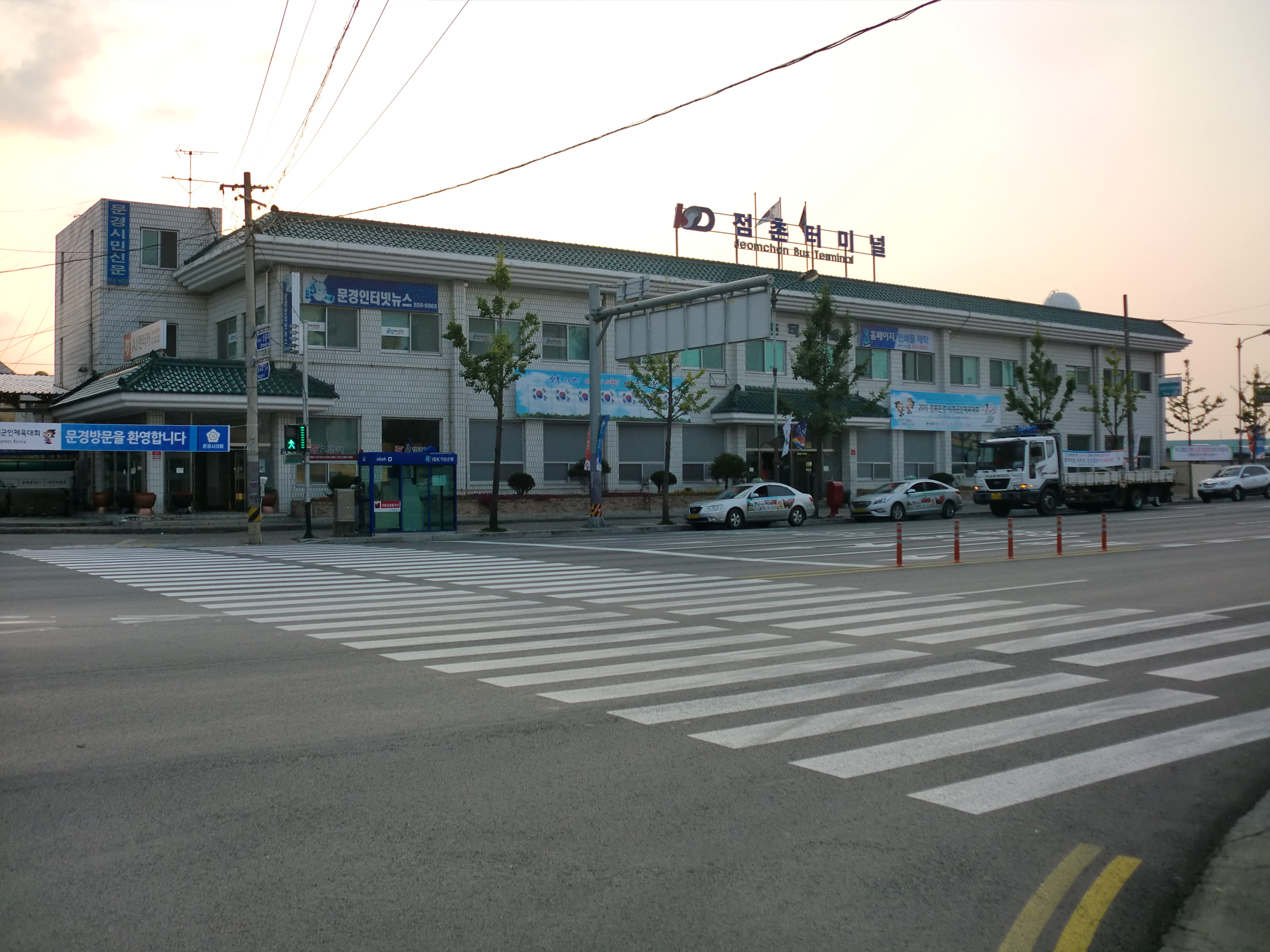 경상북도 문경시에 있는 점촌버스터미널